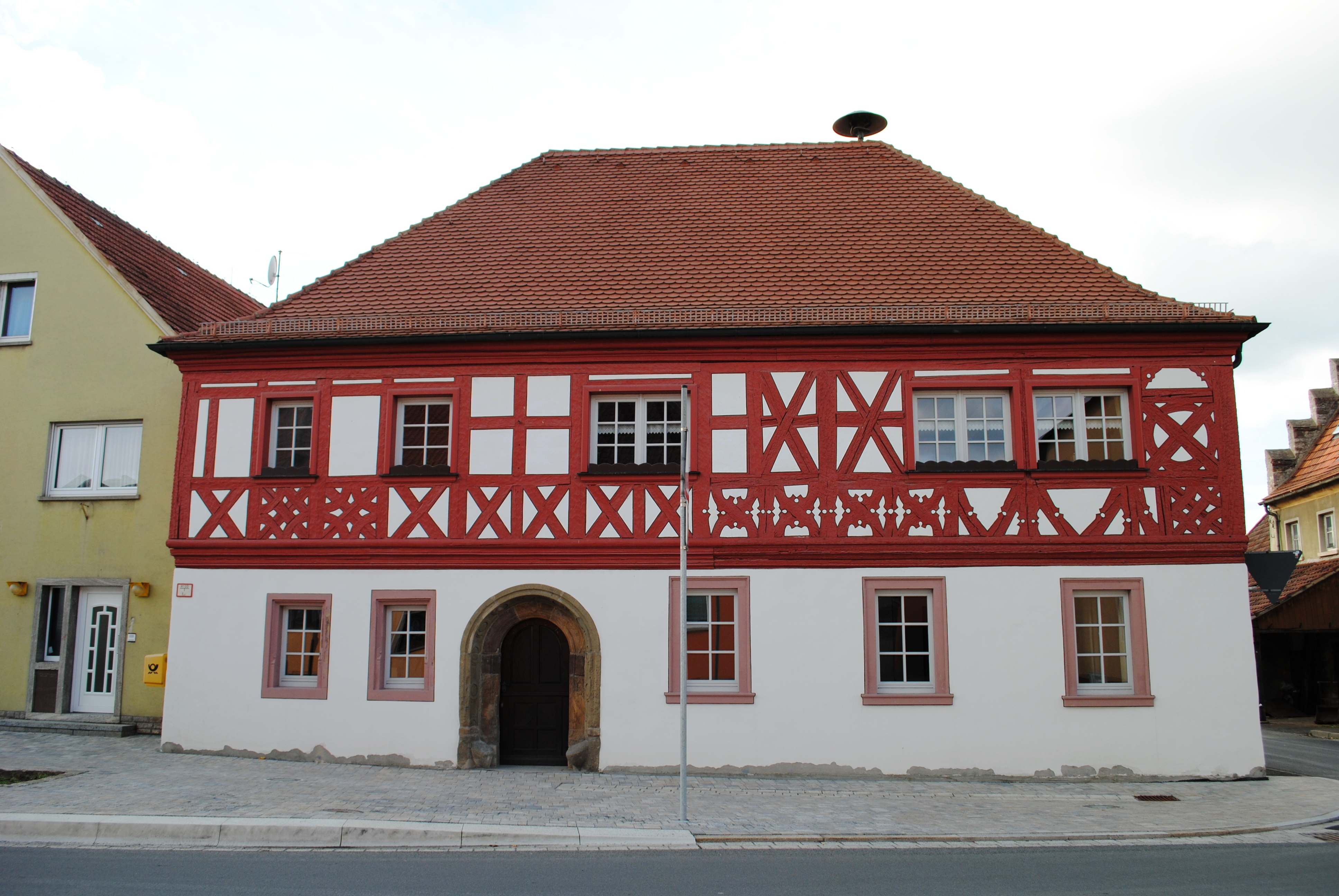 Ehemaliges Gasthaus, Marktplatz 8, Schwarzach-Stadtschwarzach, zweigeschossiger traufseiteiger Walmdachbau mit Zierfachwerkobergeschoss und Sandsteinportal mit Sitznischen, bez. 1583, erneuert 1979/1980; D-6-75-165-52